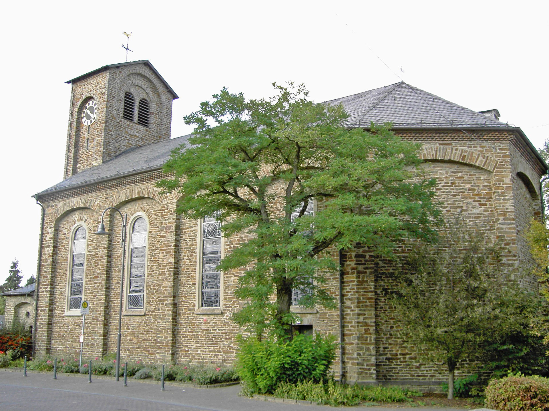 Kirche der Gemeinde Waldesch, architect: Johann Claudius von Lassaulx